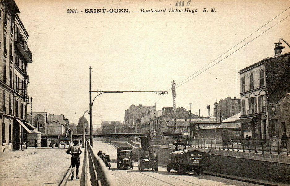 Saint-Ouen.Boulevard Victor-Hugo.Rue Arago.Rue de Clichy.Pont ferroviaire